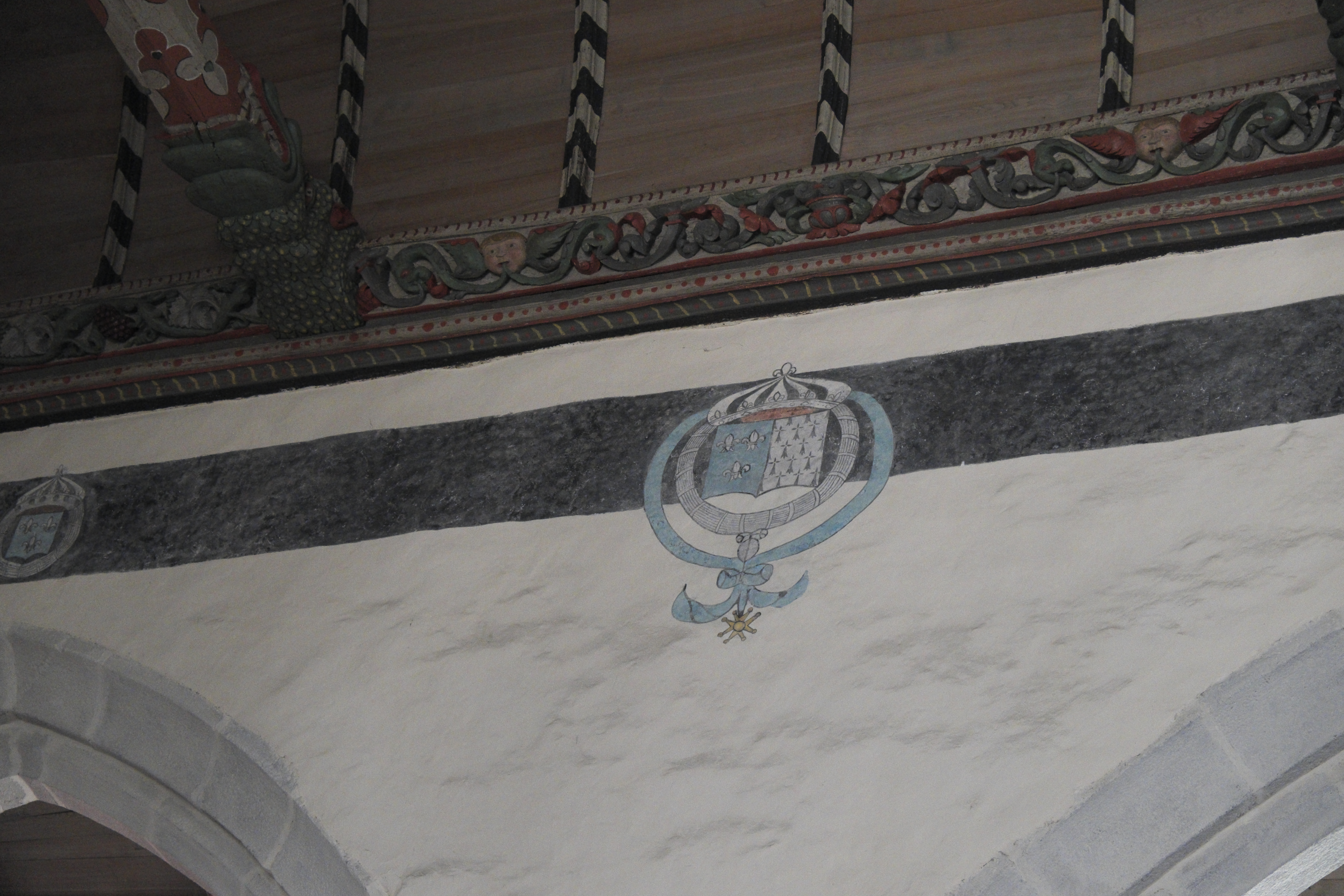 Katholische Pfarrkirche Notre-Dame-de-Croaz-Batz in Roscoff im Département Finistère (Region Bretagne/Frankreich), bemalte Holzdecke mit skulptierten Balken, Trauerband (Litre funéraire)